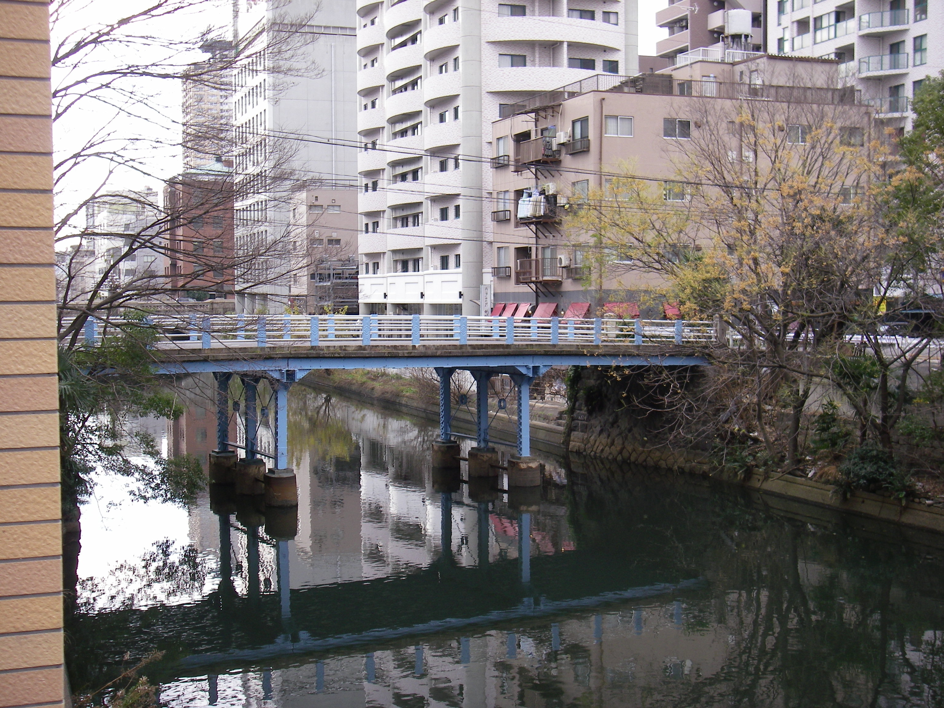 中橋（愛知県名古屋市） 堀川七橋の一つ。中村区、中区に跨る。